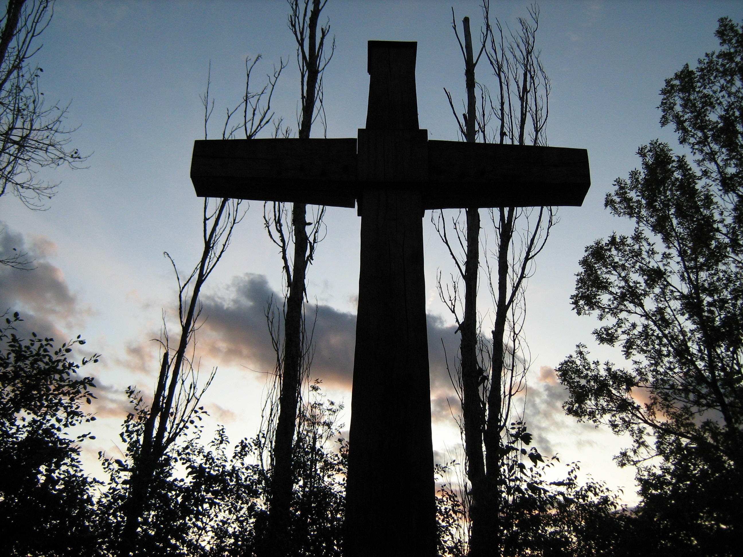 Croix en l'honneur du Récollet Nicolas Viel et de son compatriote surnommé Ahuntsic au parc-nature de l'Île-de-la-Visitation à Montréal en septembre 2009.